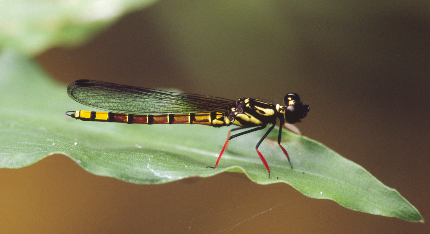 Platycypha eliseva spec. nov. male near Lokutu, DRC